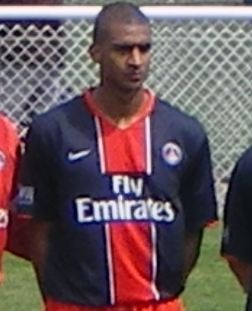 L'équipe réserve du PSG lors de la saison 2007-2008 de CFA avant d'affronter l'Aviron Bayonnais.